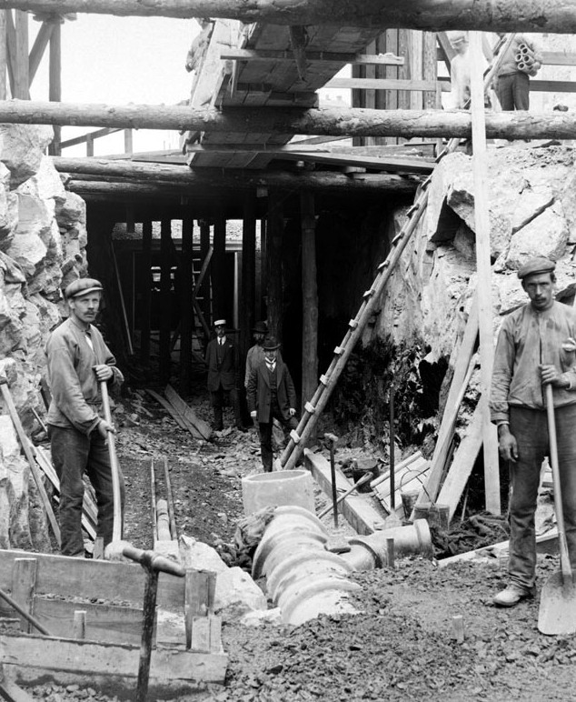 Dragning av avloppsrör i Kungsgatan, Stockholm